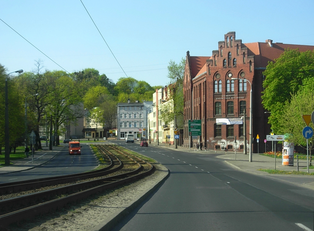 Ulica Bernardyńska w Bydgoszczy